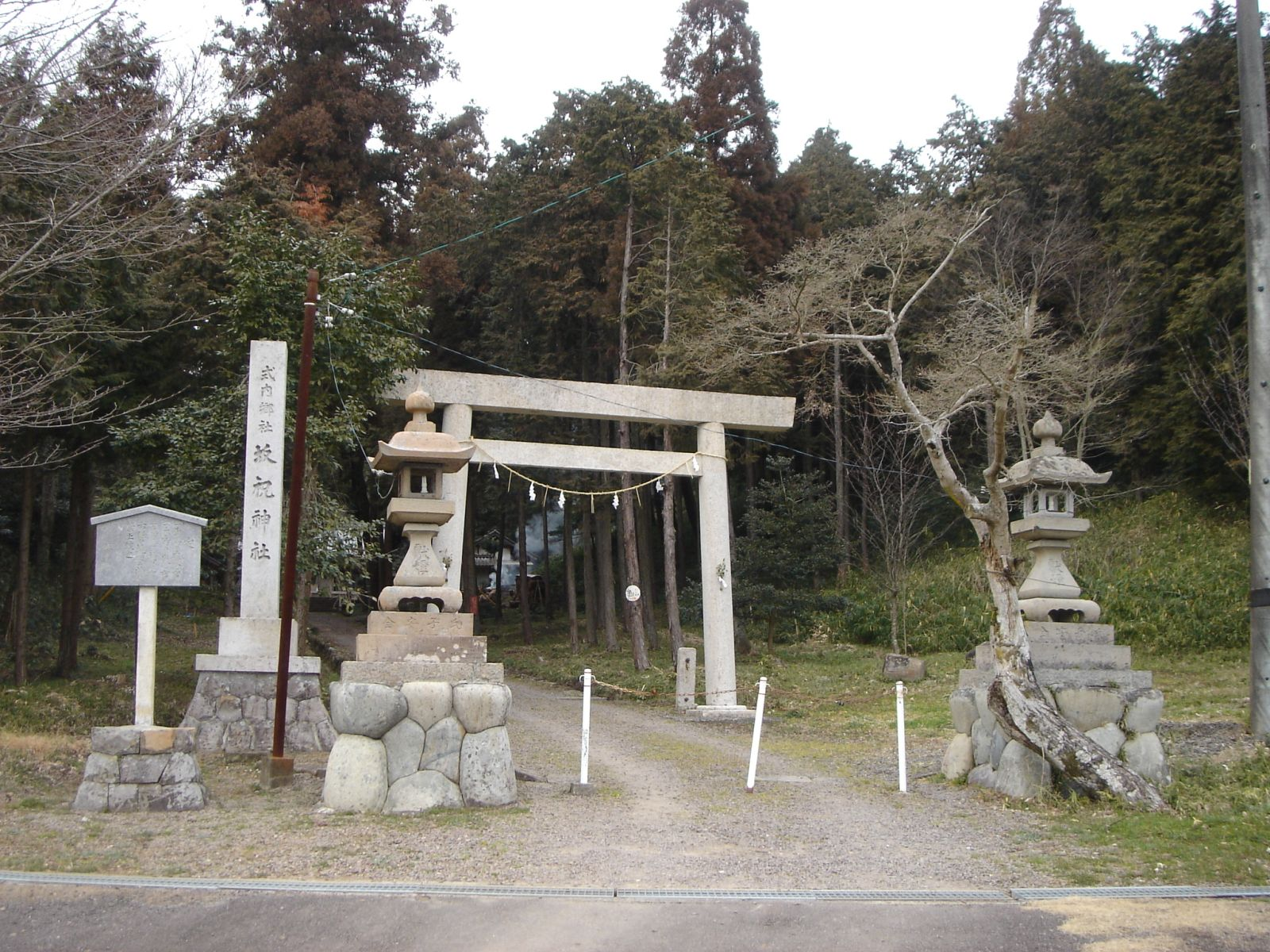 Sakahogi Jinja(Shrine)in Sakahogi(坂祝神社),Sakahogi,Gifu,Japan(岐阜県坂祝町)で撮影。